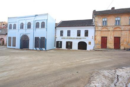 Centrul vechi din Roșia Montană